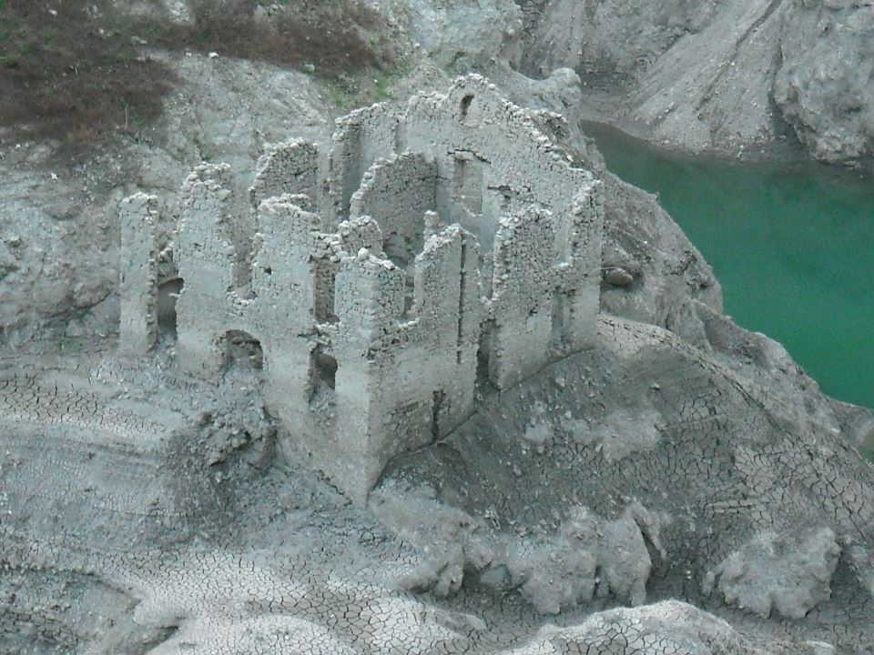 ex caserma della Regia Guardia di Finanza nella Valle del Toscolano in Val Vestino